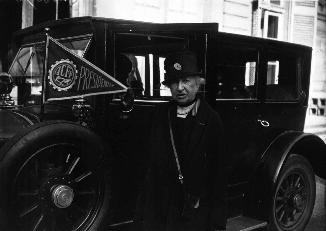 Anne de Rochechouart de Mortemart, duchesse d'Uzès, fondatrice et première présidente de l'Automobile Club féminin